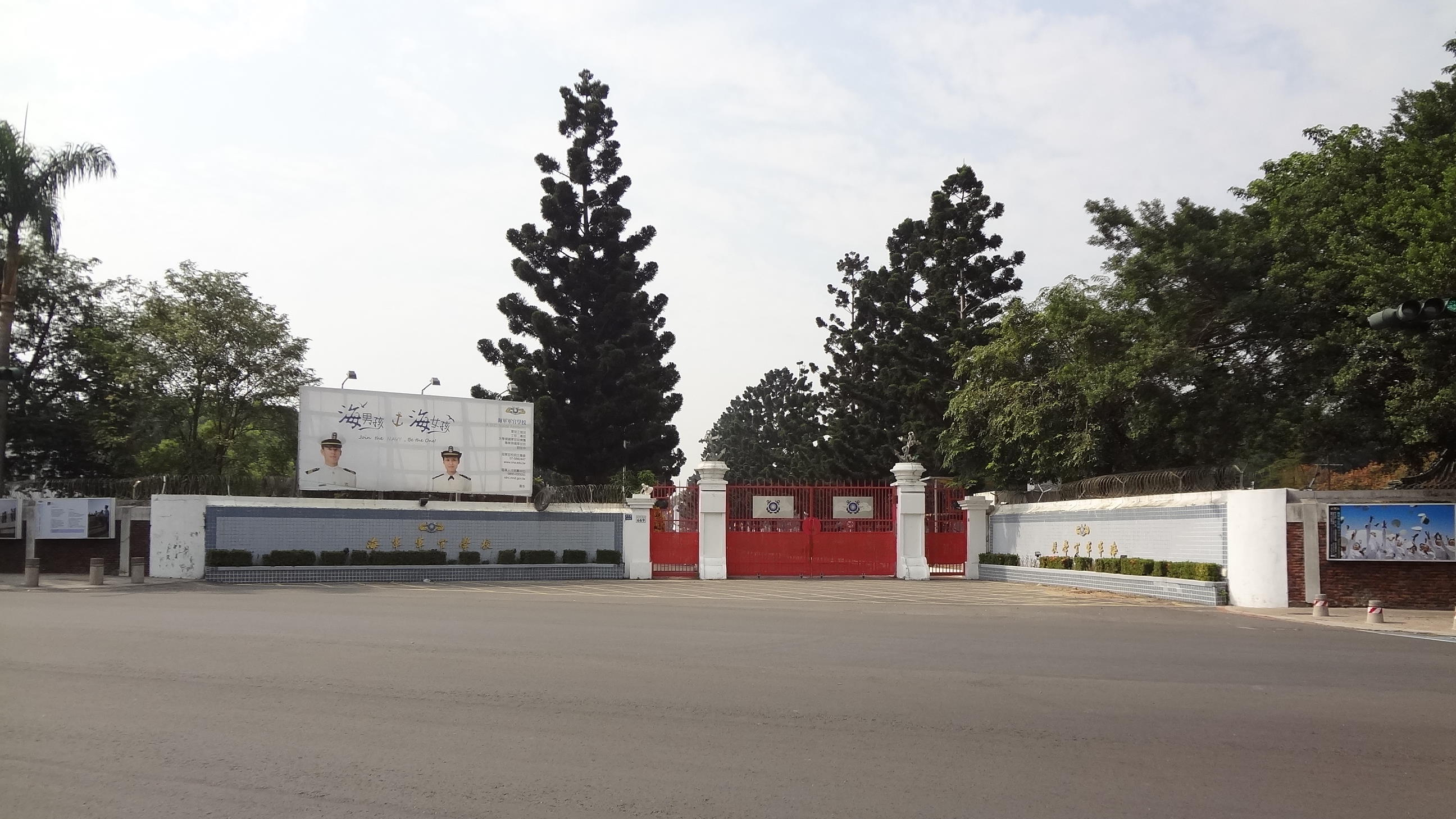 中華民國海軍軍官學校側門，地址：高雄市左營區軍校路669號。